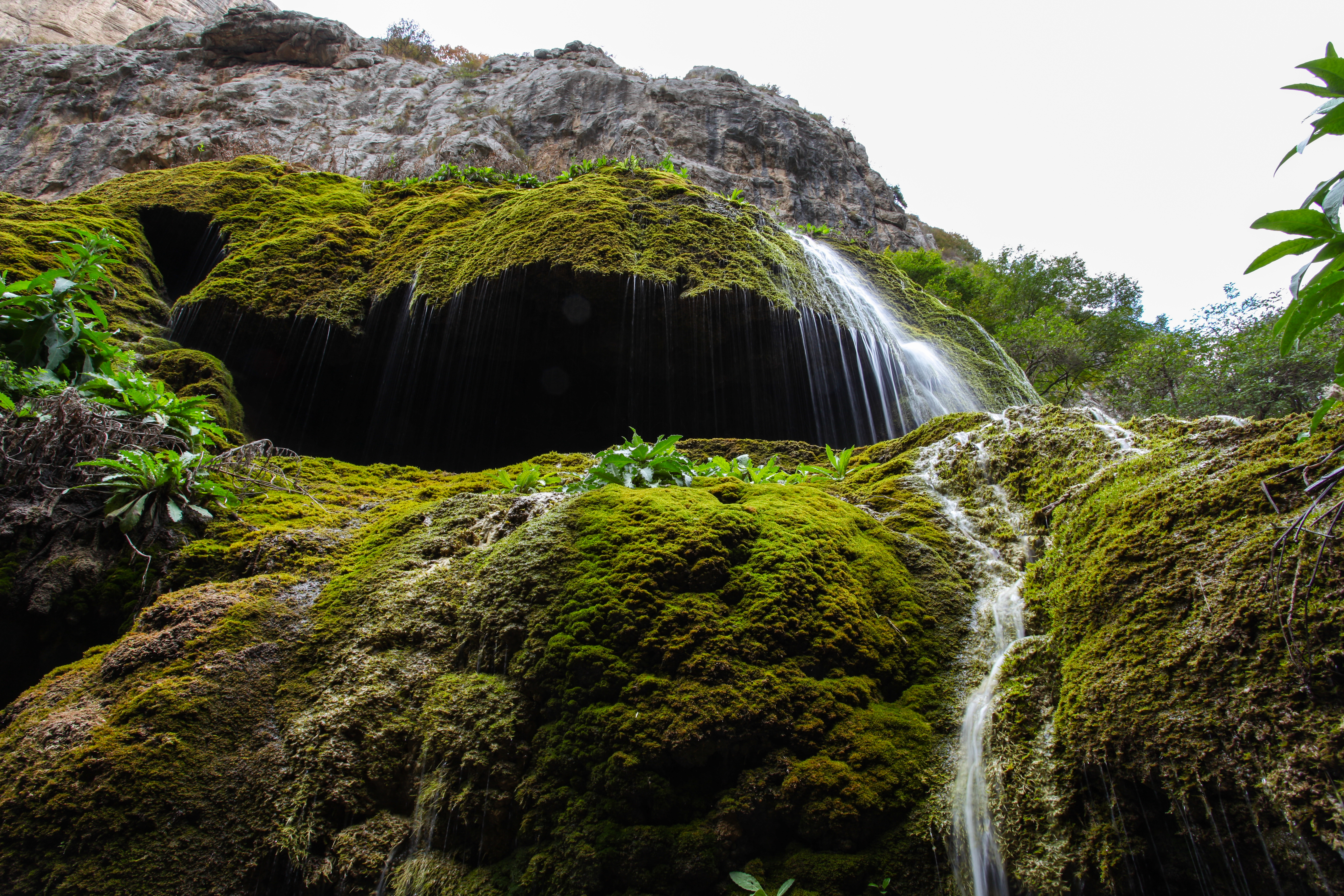 Զոնտիկներ